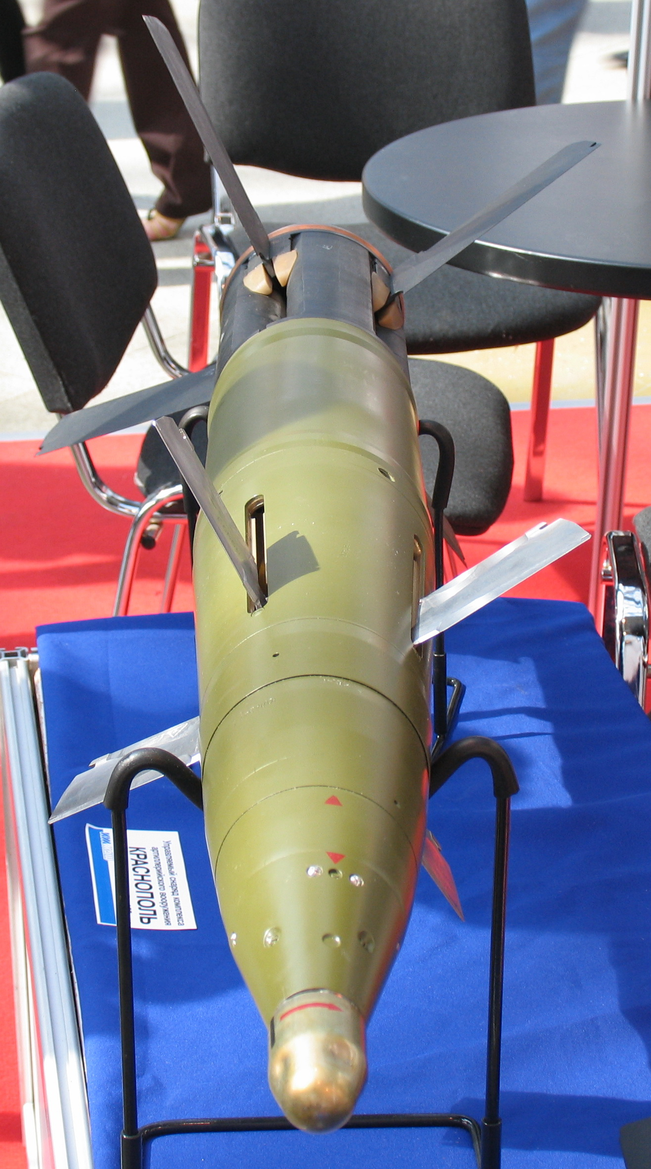 2K25 Краснополь спереди